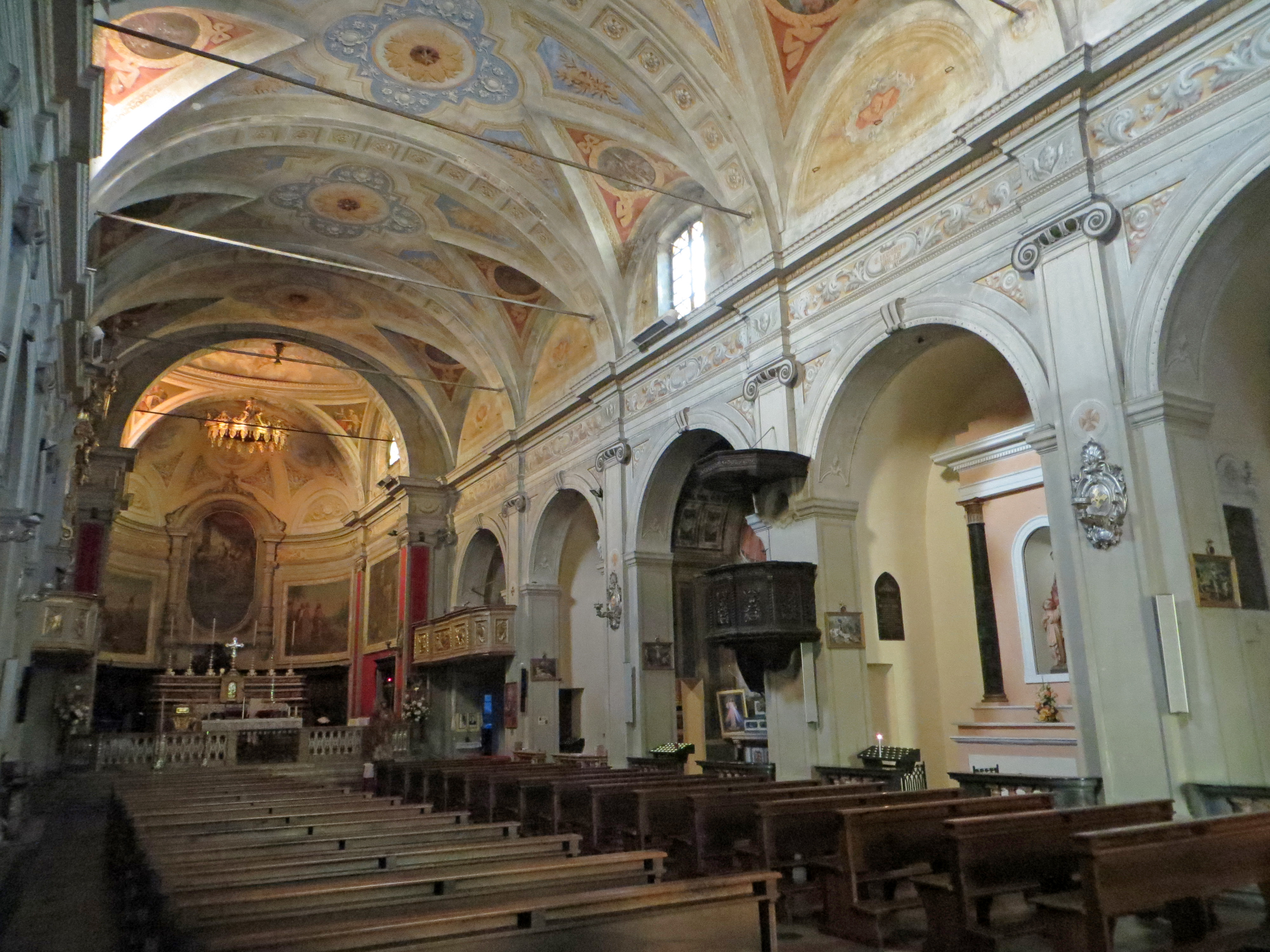 Collegiata di San Giovanni Battista (Pieveottoville, Polesine Zibello) - navata